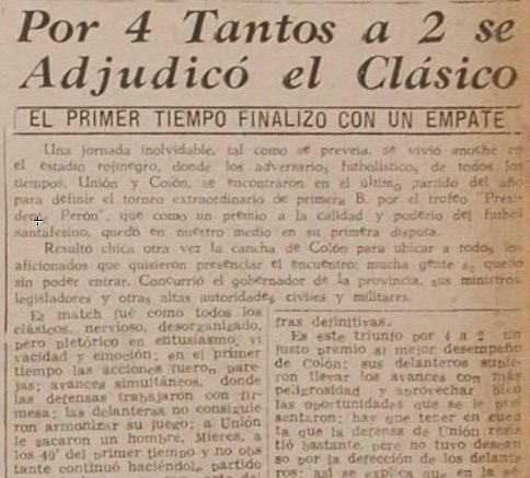 Diario local destacaba en primera plana el triunfo sabalero